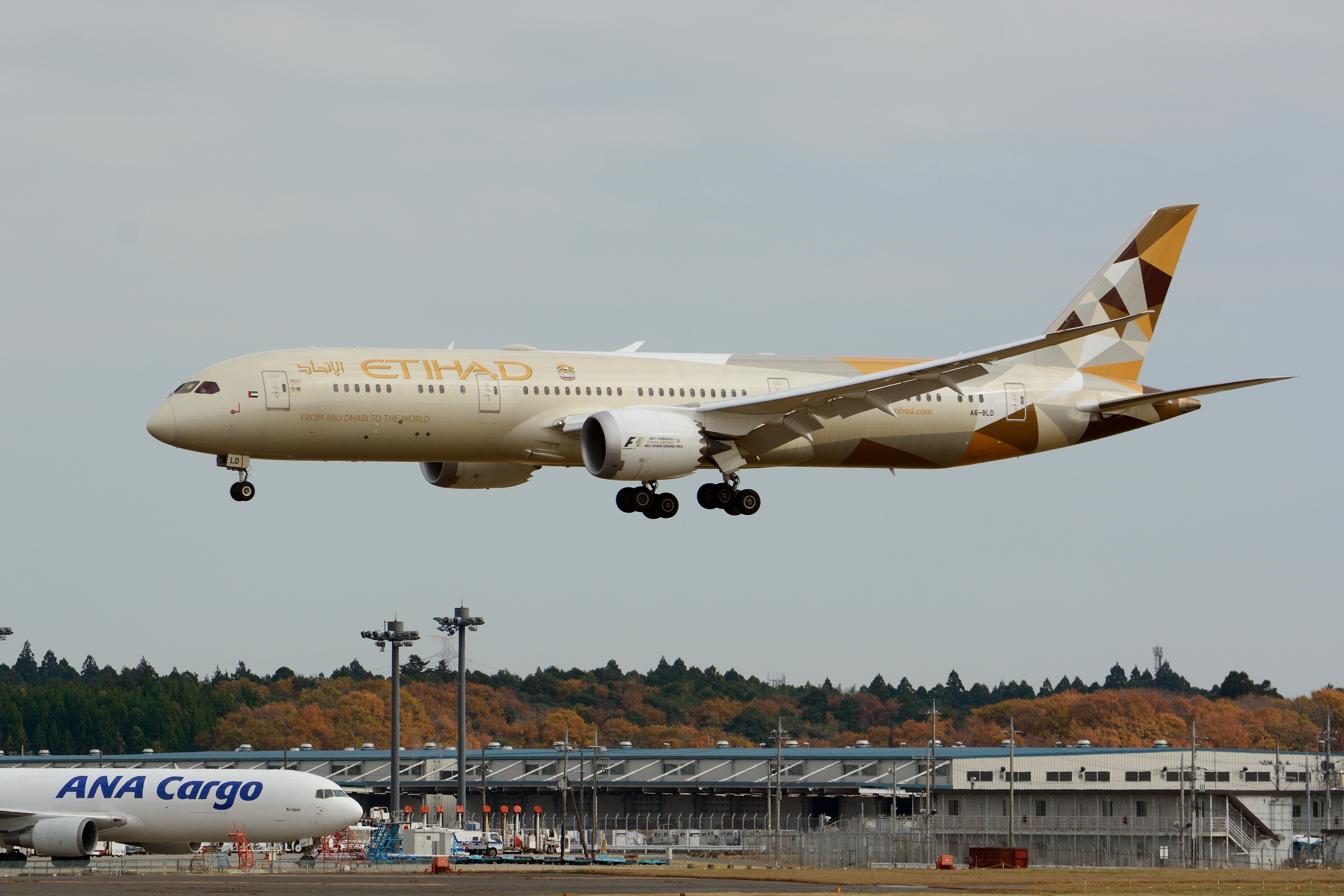 Edihad Airways, Boeing 787-9 A6-BLD NRT